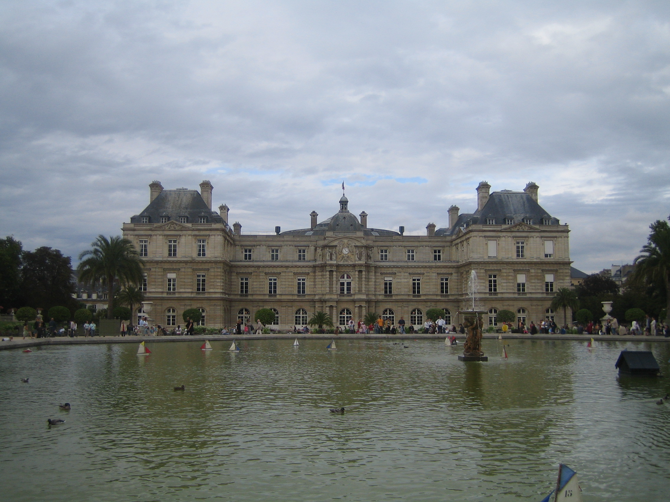 Le Palais du Luxembourg, Paris.